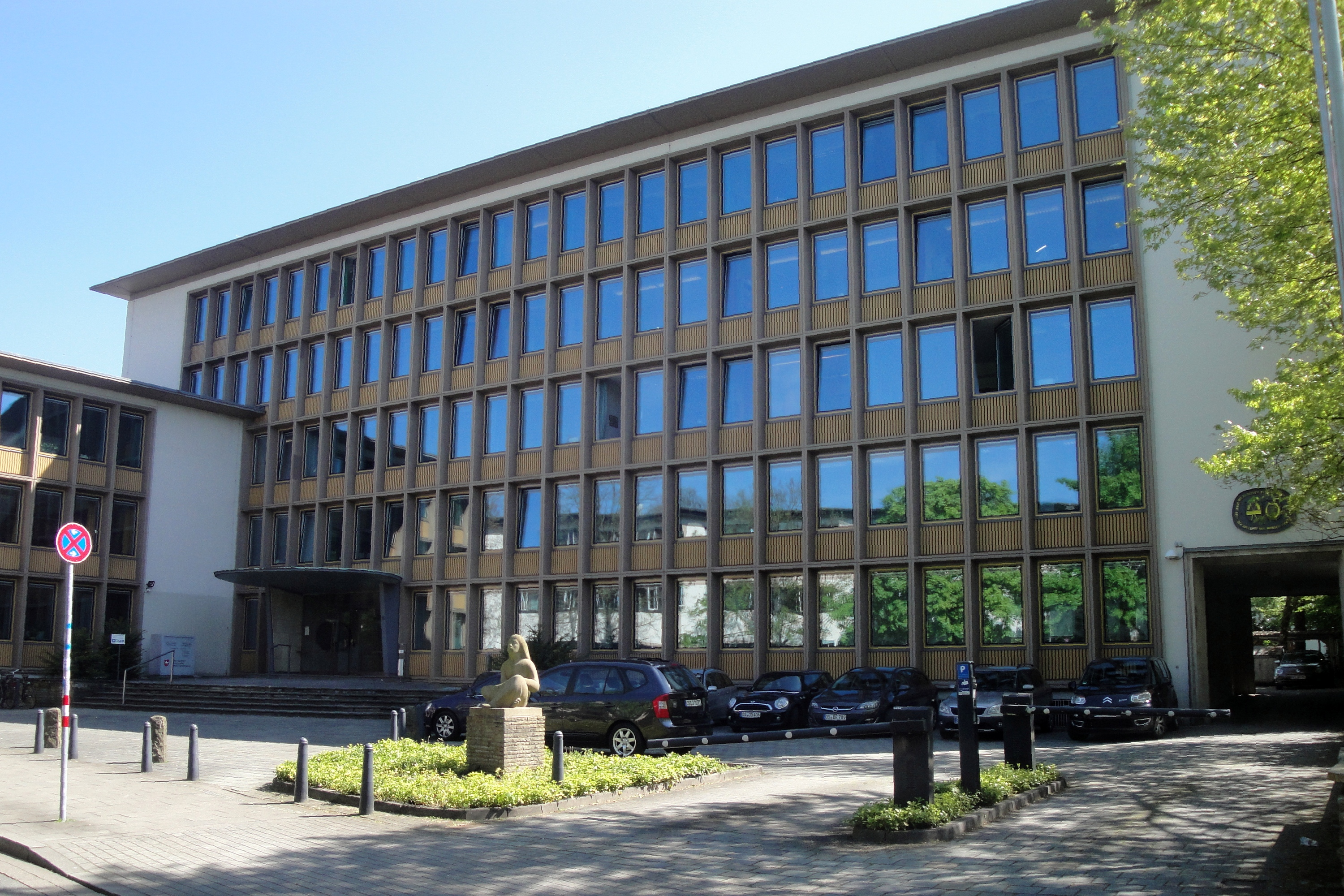 Fachgerichtszentrum (Arbeitsgericht, Sozialgericht und Verwaltungsgericht), Osnabrück